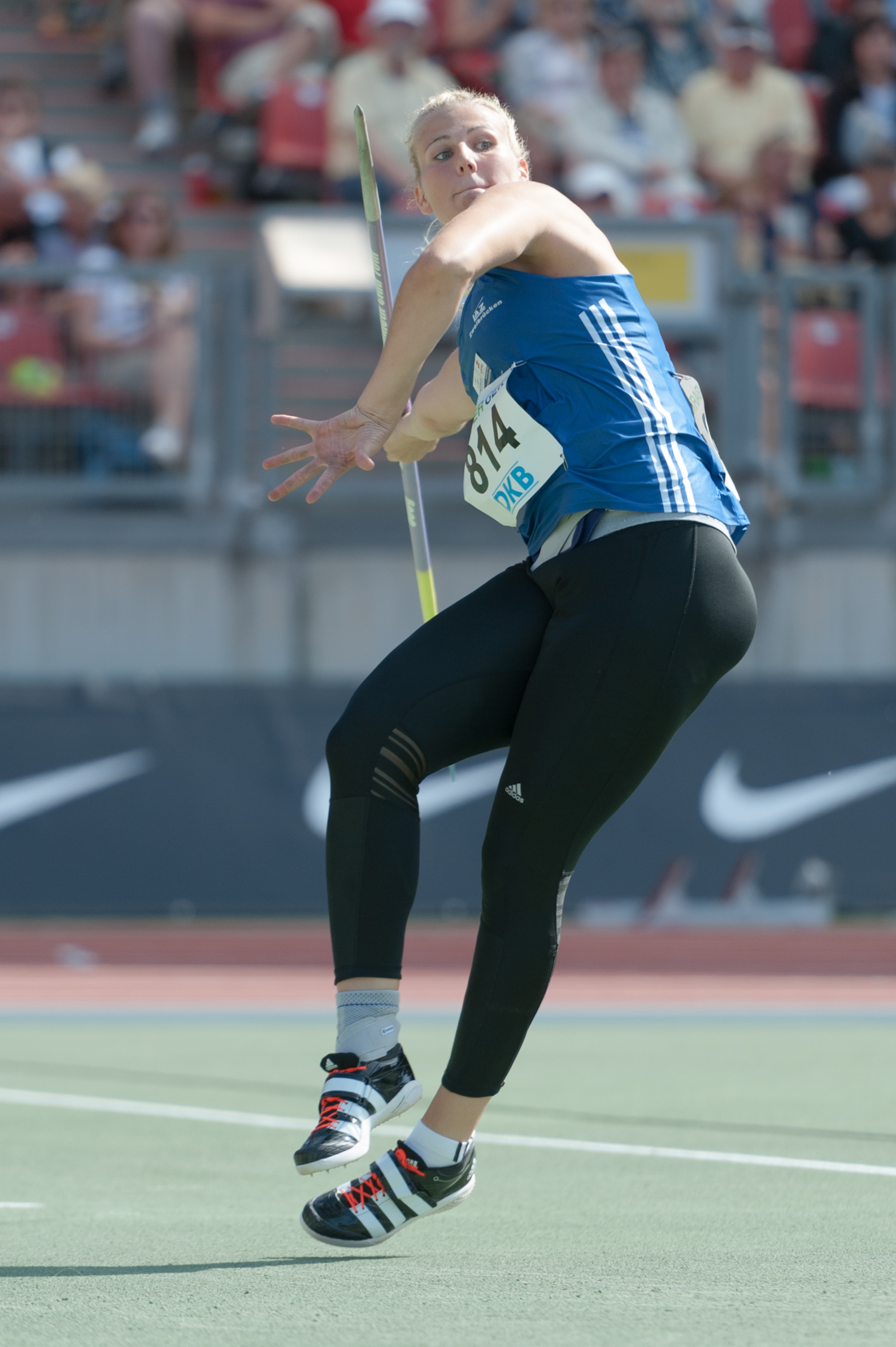 Deutsche Leichtathletik-Meisterschaften 2015: Frauen Speerwurf - Christin Hussong, LAZ Zweibrücken